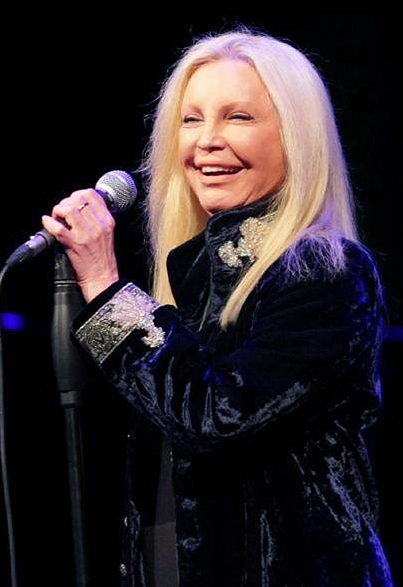 Patty Pravo durante la manifestazione Le strade di San Nicola al teatro Petruzzelli di Bari